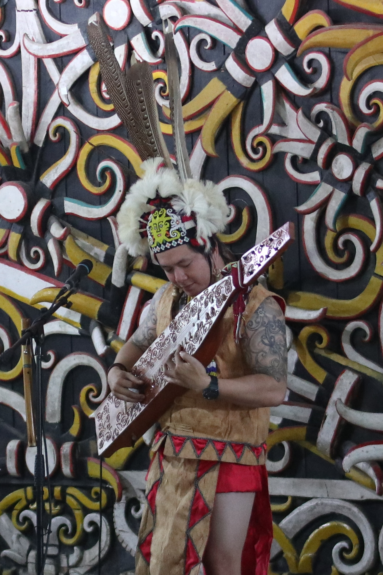 Uyau Moris, seniman Sape Dayak Indonesia.